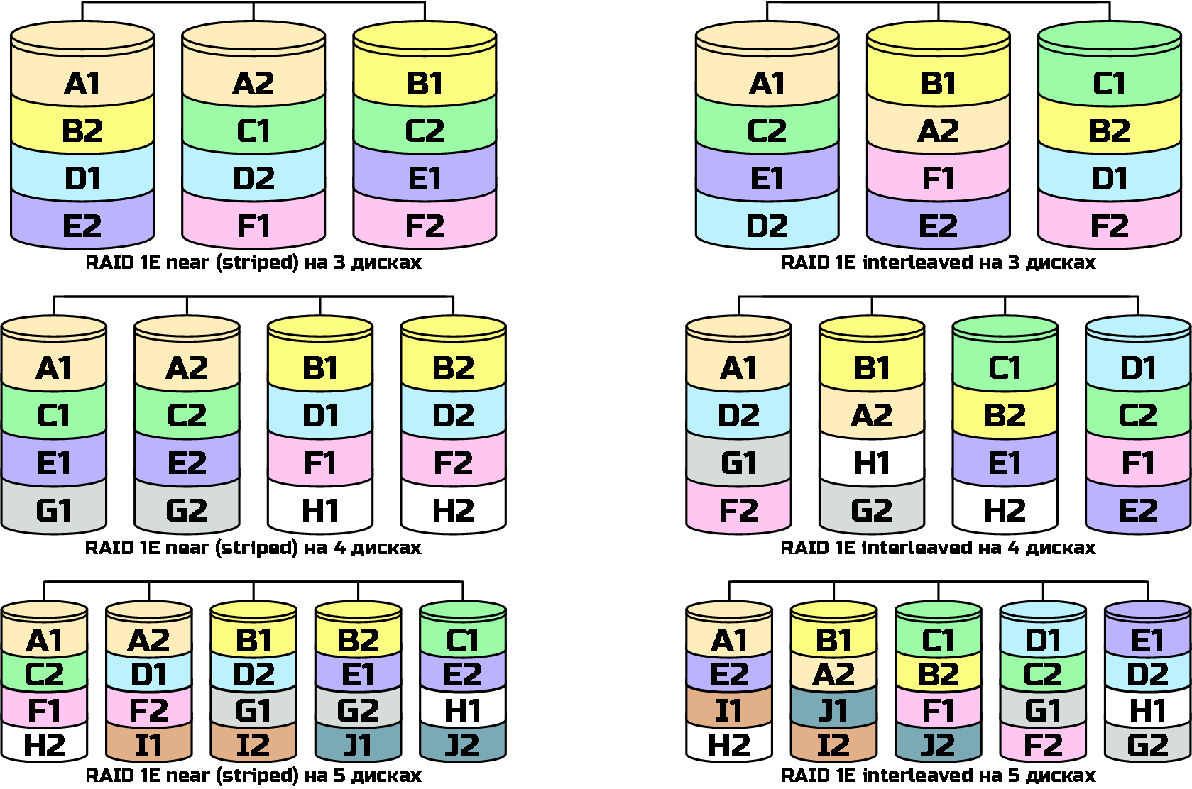 Схема дискового массива RAID 1E в двух вариантах для 3, 4 и 5 устройств